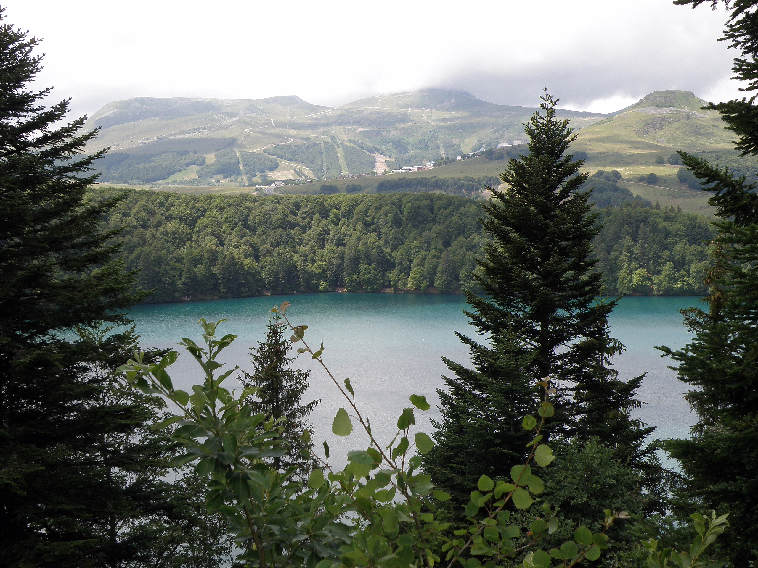 Le lac Pavin, dans la commune de Besse-et-Saint-Anastaise, Puy-de-Dôme (France, région Auvergne). Le lac vu depuis un lieu en contre-haut de la rive sud-est, en regardant vers l'est-nord-est. À l'arrière-plan à gauche, puy de Paillaret (alt. 1721 m.), strié de routes et de pistes de ski. Le morne au fond à droite est le puy de Chambourguet (alt. 1520 m.). Entre les deux, caressés par un nuage, le puy de la Perdrix et le puy Ferrand. Un peu plus près de nous, nous distinguons les constructions de la station de ski et de villégiature Super-Besse.